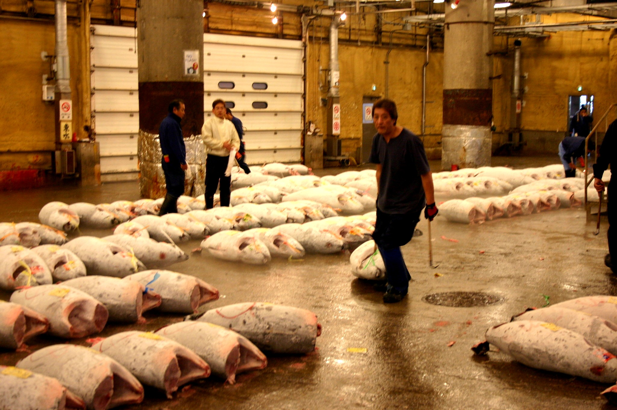 Foto scattata da me al mercato di Tsukiji (Tokyo)